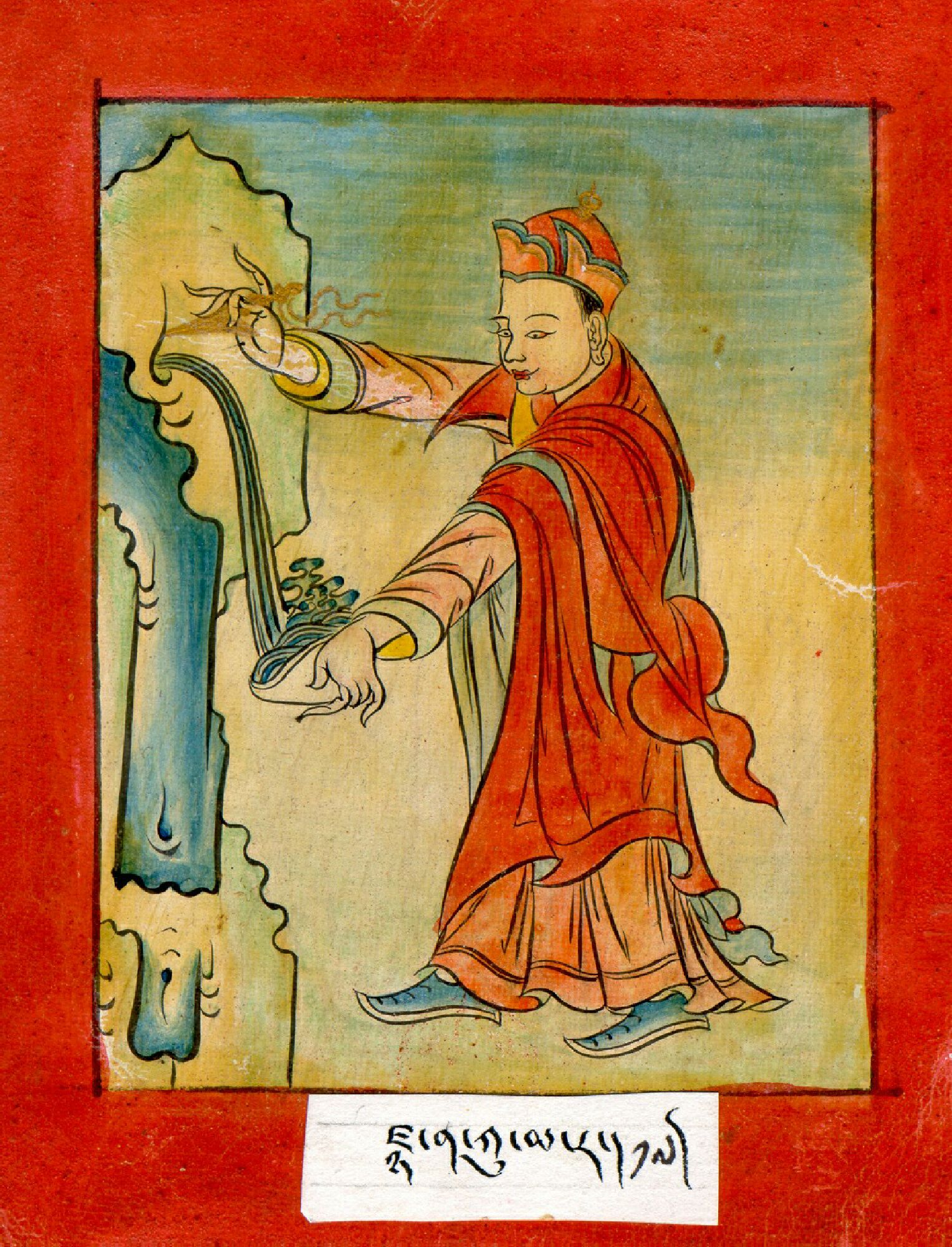 Jnyanakumara , 8th Century Tibetan translator